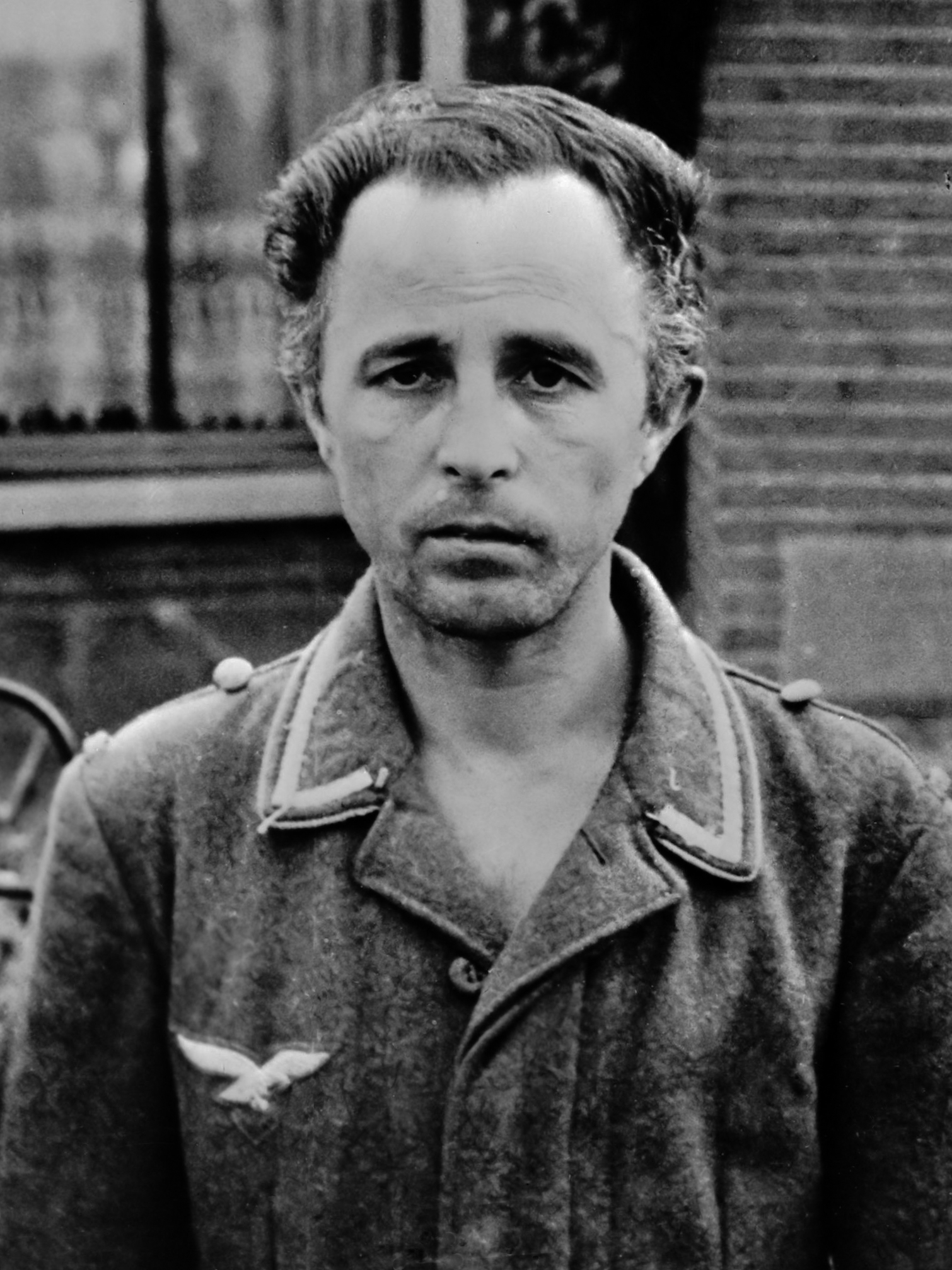 Oorlogsmisdadigers WOII: Joseph Kotälla 1945